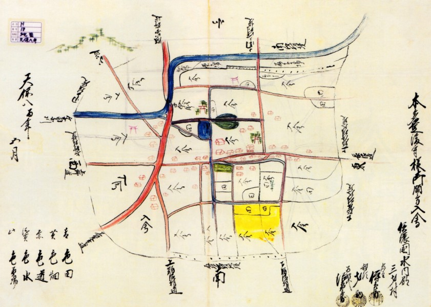 天保8年三才村入会絵図